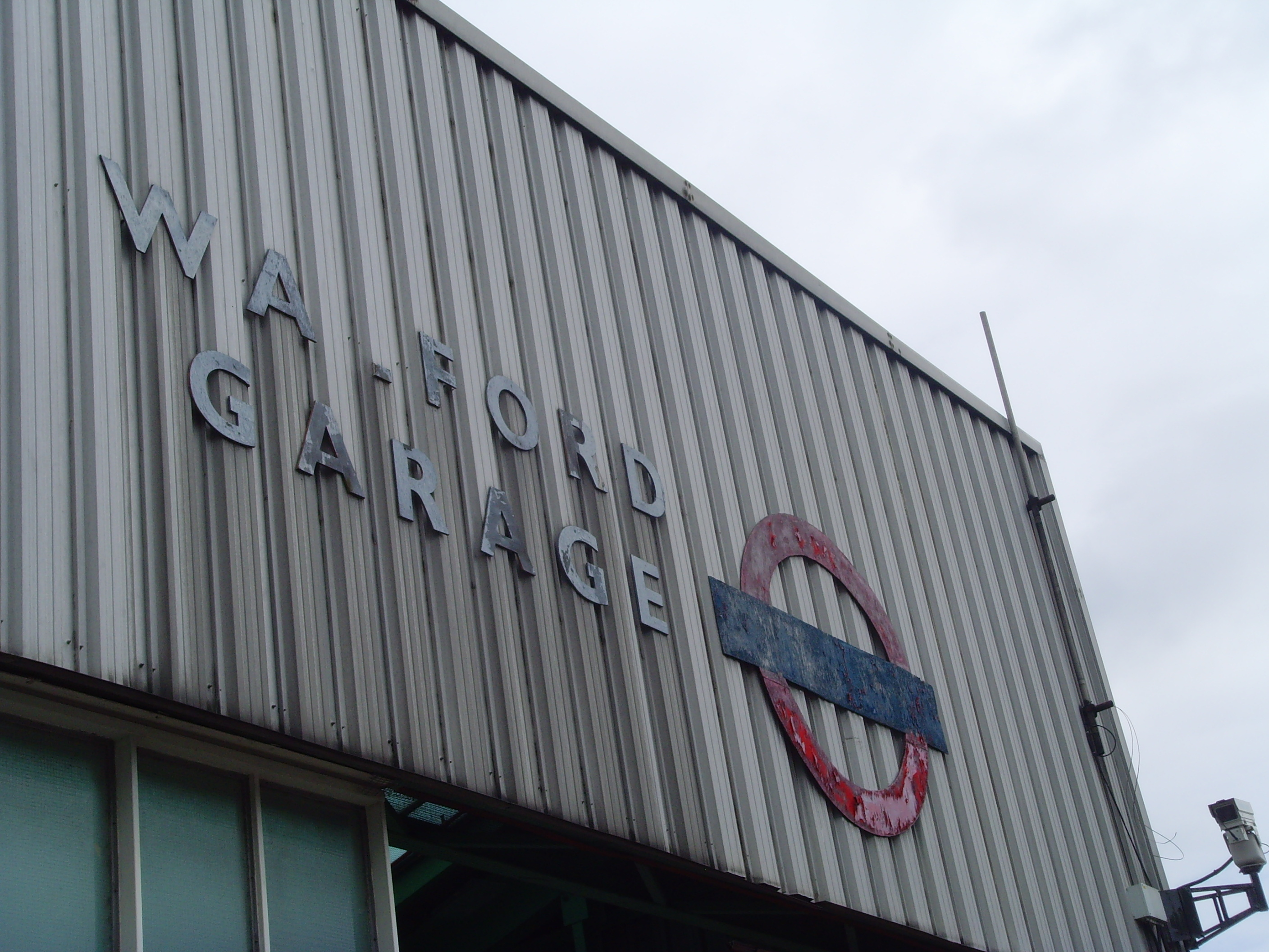 SNV31248.JPG